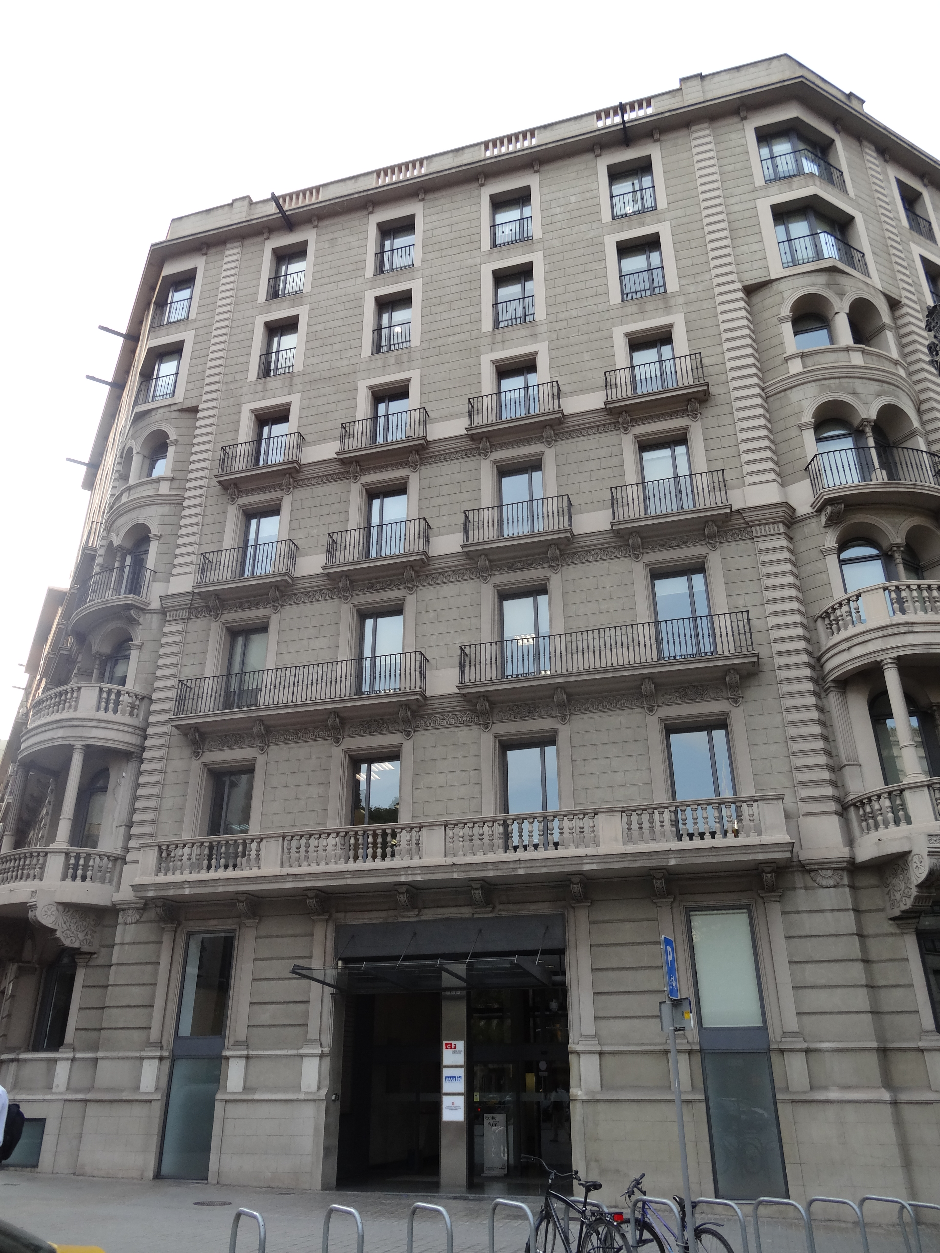 Seu de l'Institut Català de Finances. Gran Via de les Corts Catalanes, 635